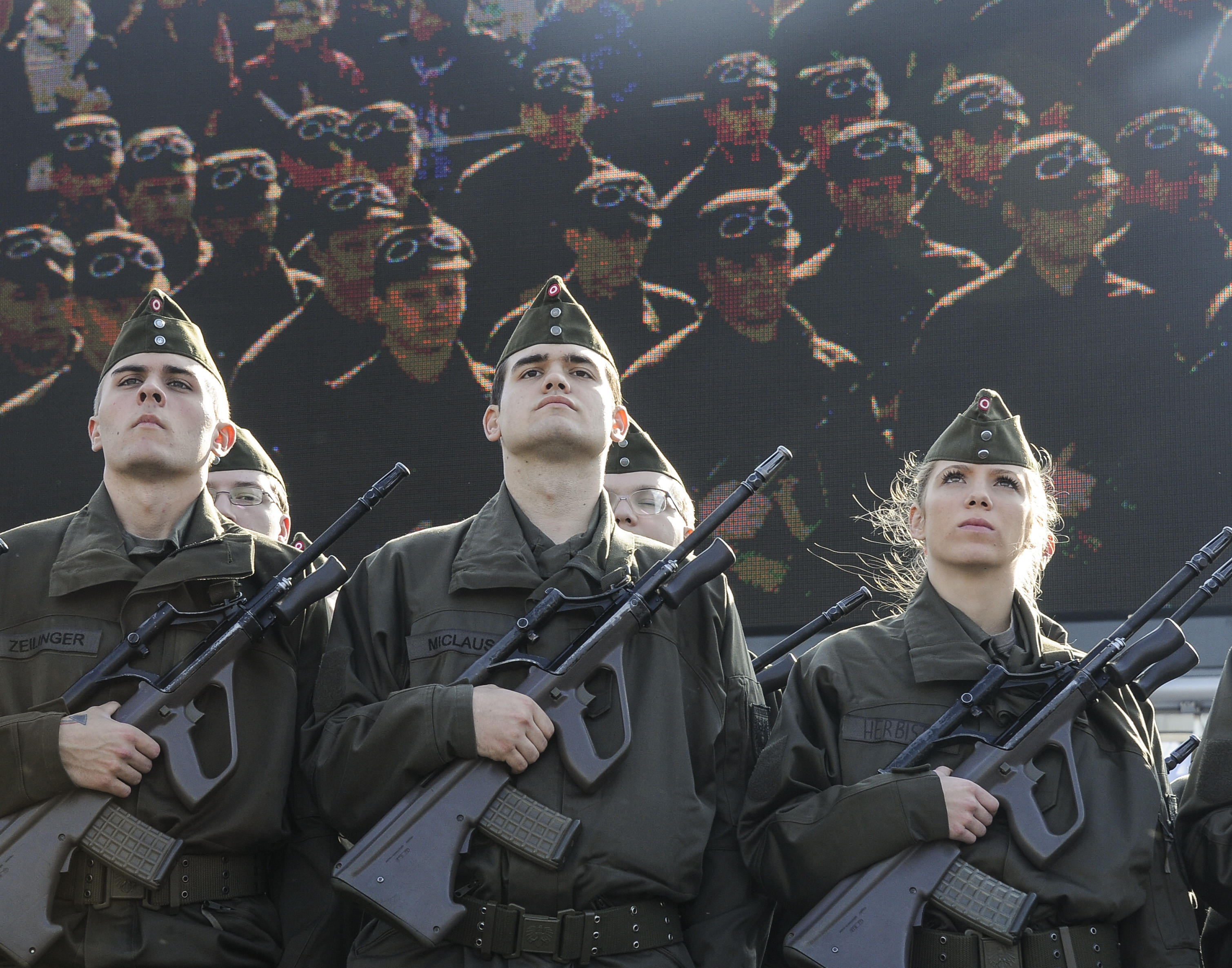 1.360 Soldatinnen und Soldaten wurden am Heldenplatz angelobt.